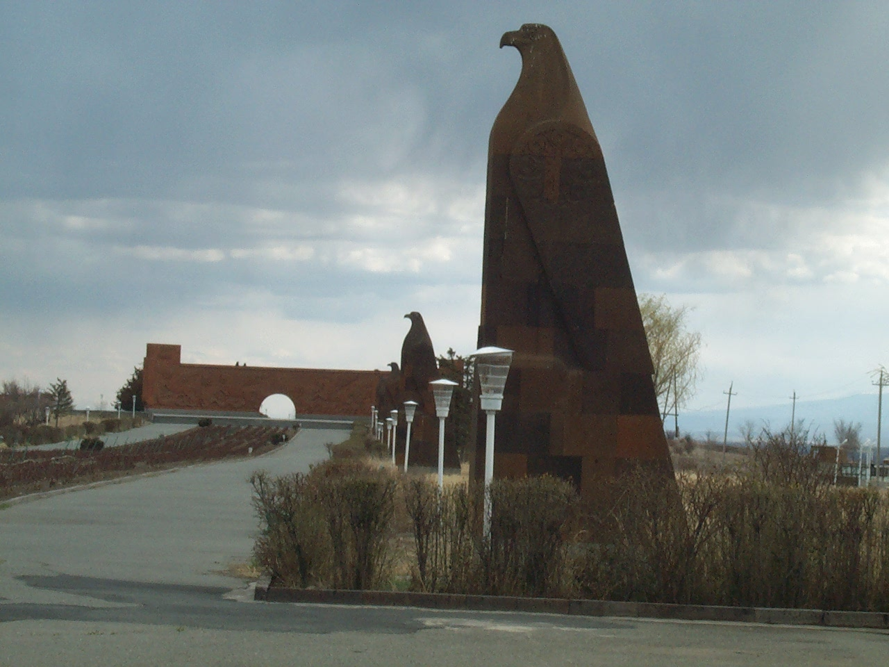 ՀՈՒՇԱՀԱՄԱԼԻՐ՝ ՍԱՐԴԱՐԱՊԱՏԻ ՃԱԿԱՏԱՄԱՐՏԻ ՀԵՐՈՍՆԵՐԻ 59/3